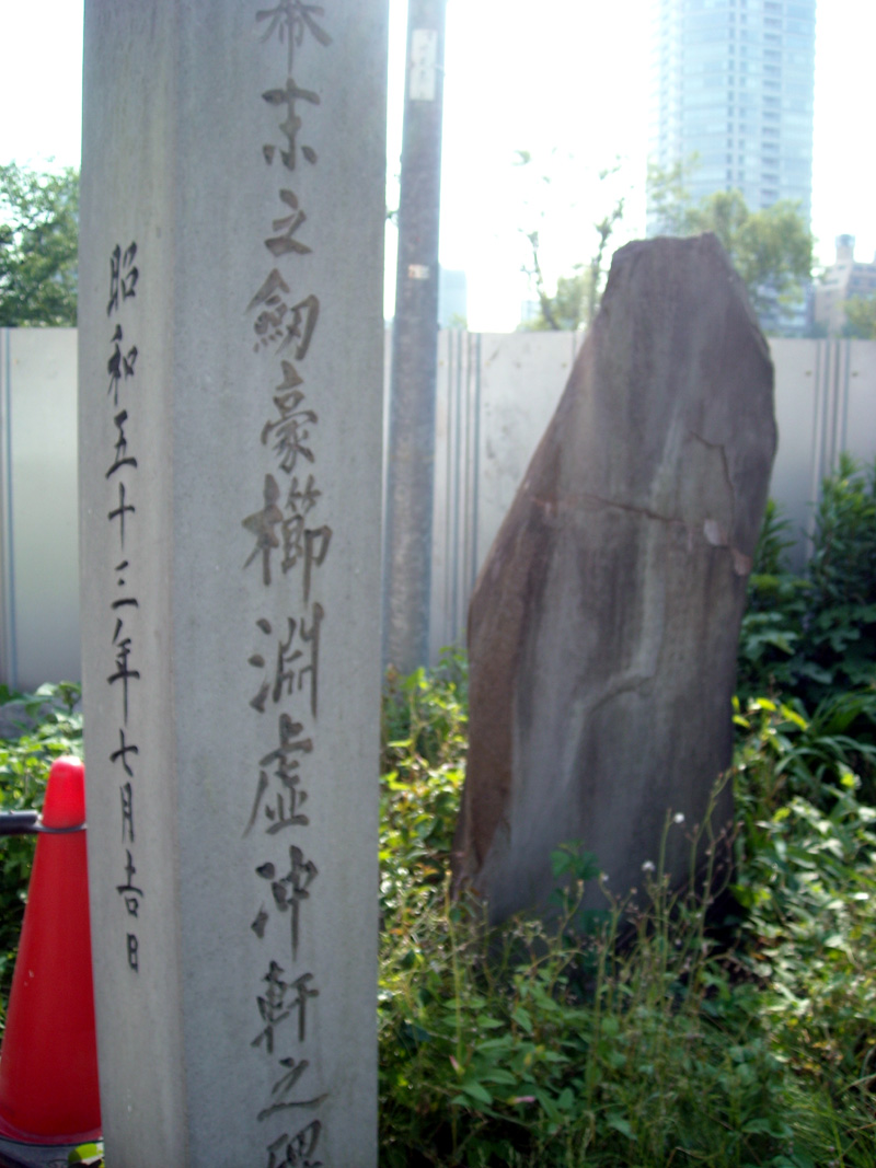 上野・不忍池。櫛淵宣根碑。